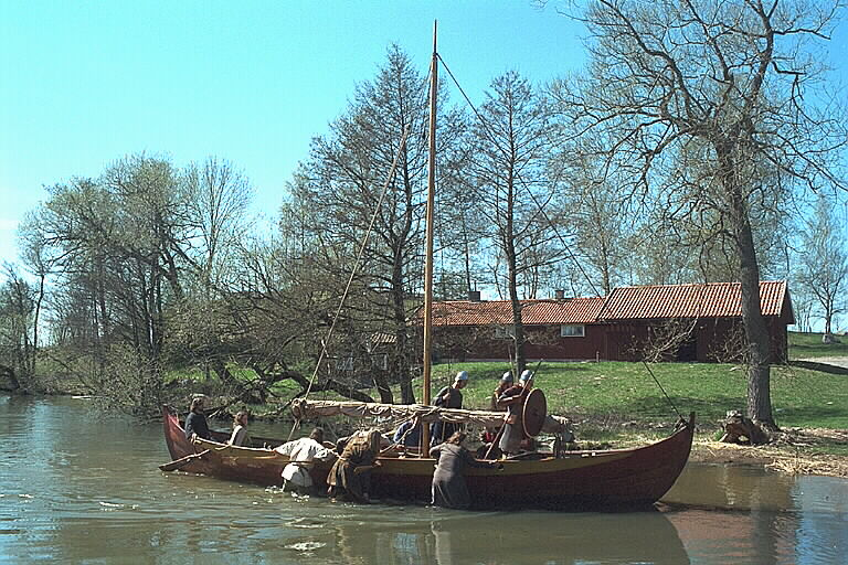 Krigare i vikingaskepp landstiger på Birka. Motiv: Björkö-Birka Nyckelord: Raä-Fastigheter, Världsarv Kategori: Museum Krigare i vikingaskepp landstiger på Birka.